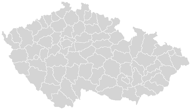 Mapka českých okresů v letech 1993-1995